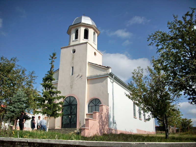 Село Дриново, община Попово. Църковният храм.